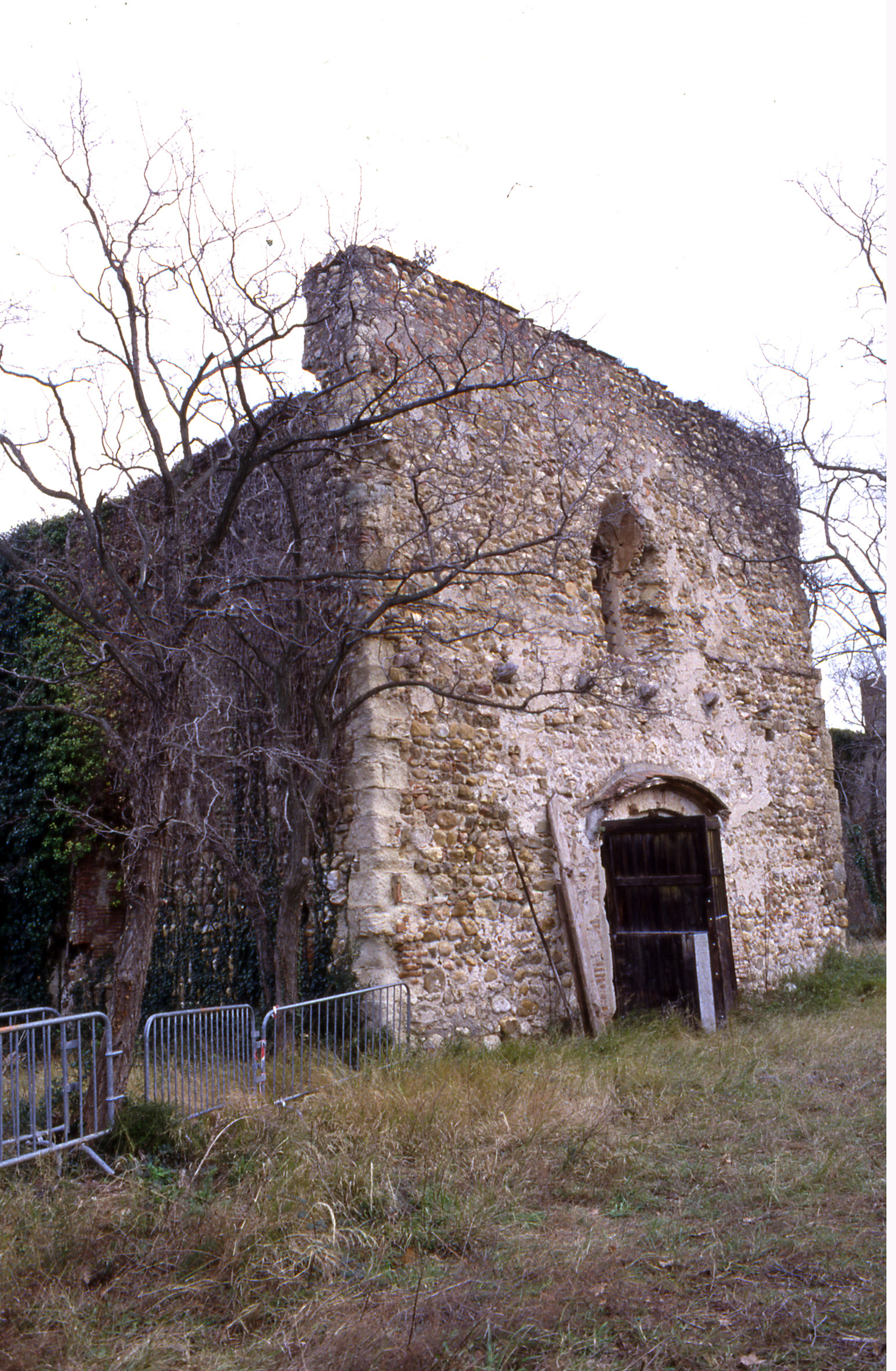 El Masdéu (Rosselló). Capella convenventual. Any 2007.